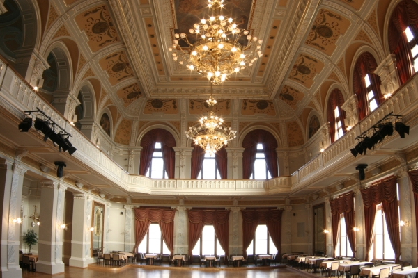 Velký sál v Měšťanské besedě v Plzni